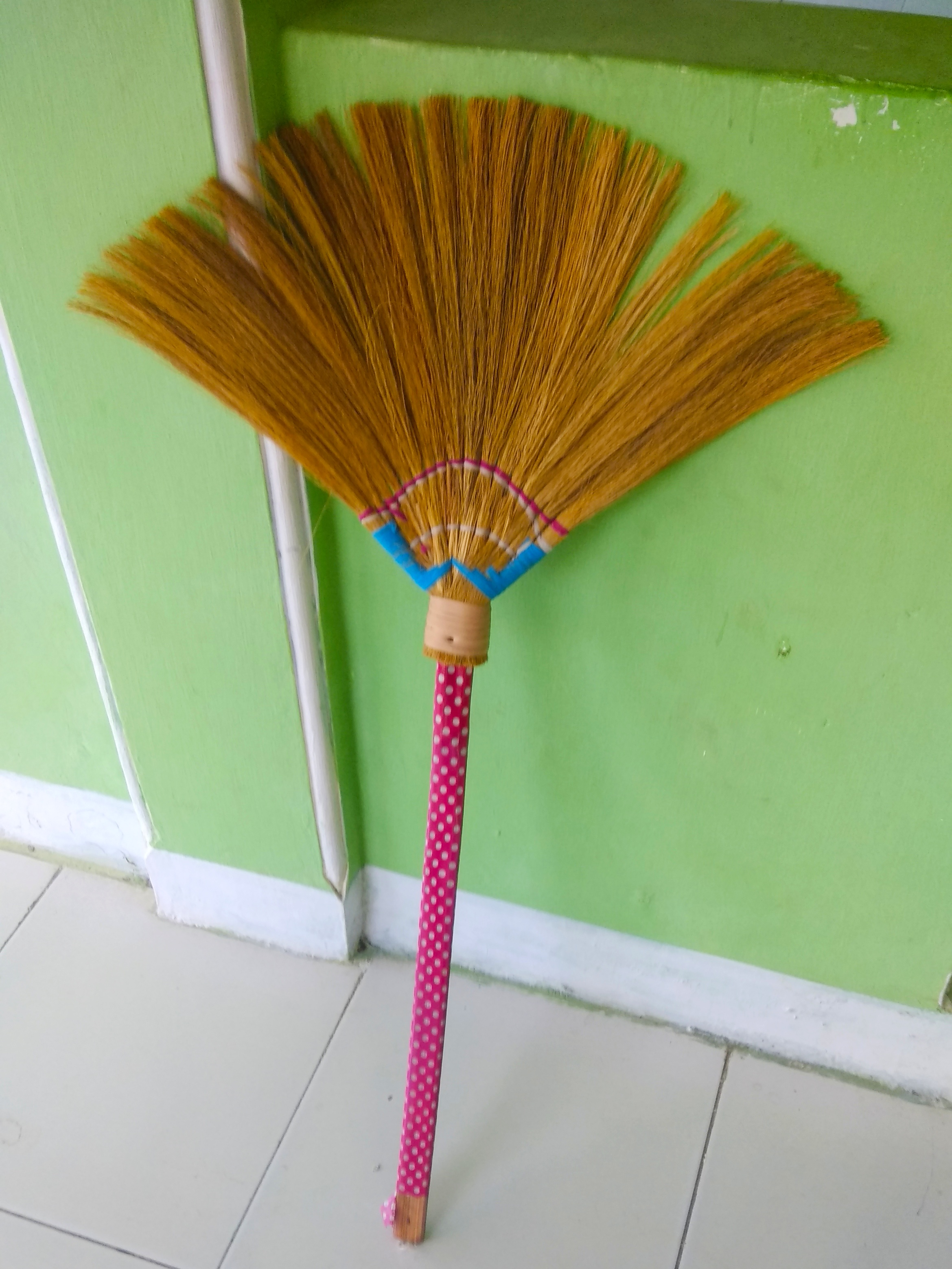 Sapu biasa Jawa: ꦱꦥꦸ ꦧꦶꦪꦱ